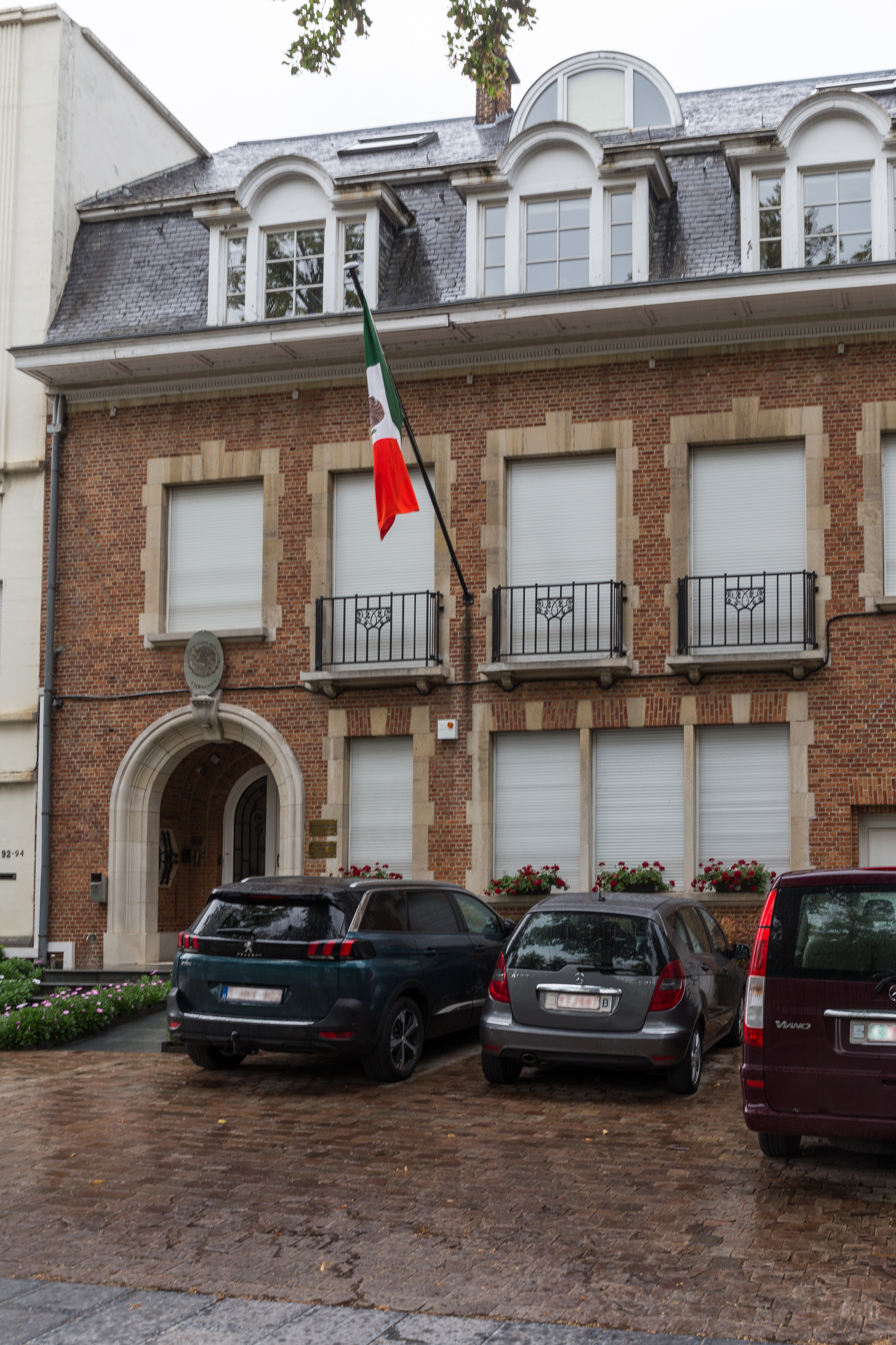 Ambassade du Mexique en Belgique, avenue Franklin Roosevelt 94 à Bruxelles.